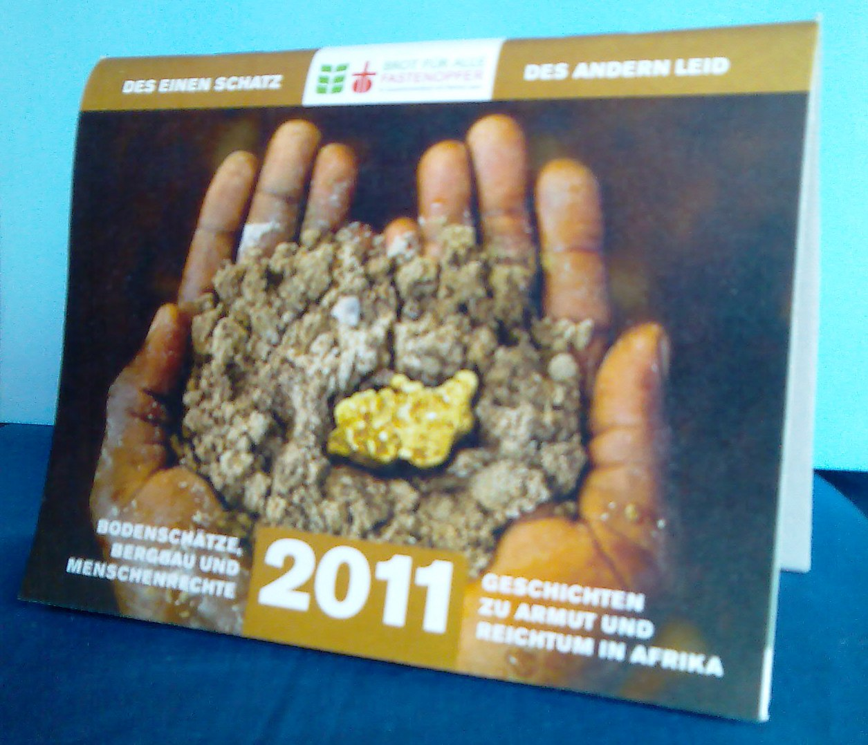 Fastenopfer, Agenda 2011 (in Kalender-Form zum aufstellen) Höhe; 11,4 cm / Länge; 14,6 cm / Breite: ca. 0,5 cm (wenn nicht aufgestellt)